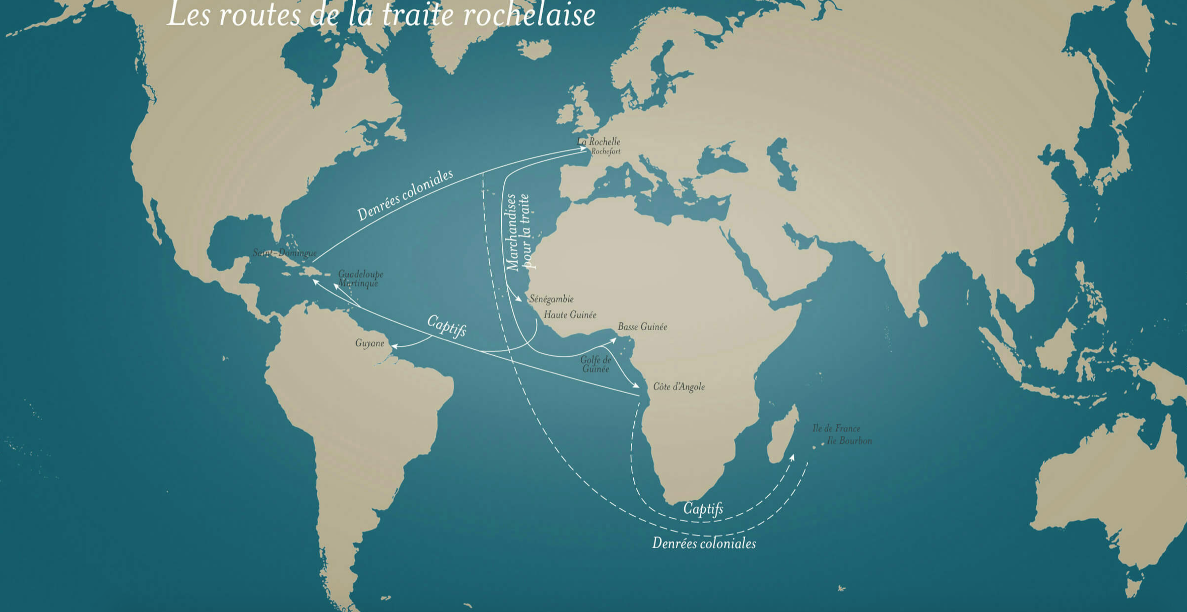 Design Laforme Arch.dép.Char.Mar